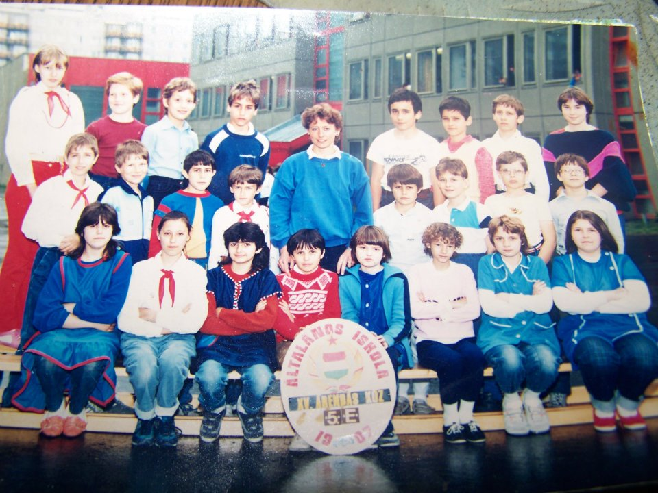 Az 1982-es évfolyam a Bethlenben, 5. E osztály (Bethlen Gábor Szakgimnázium), Budapest